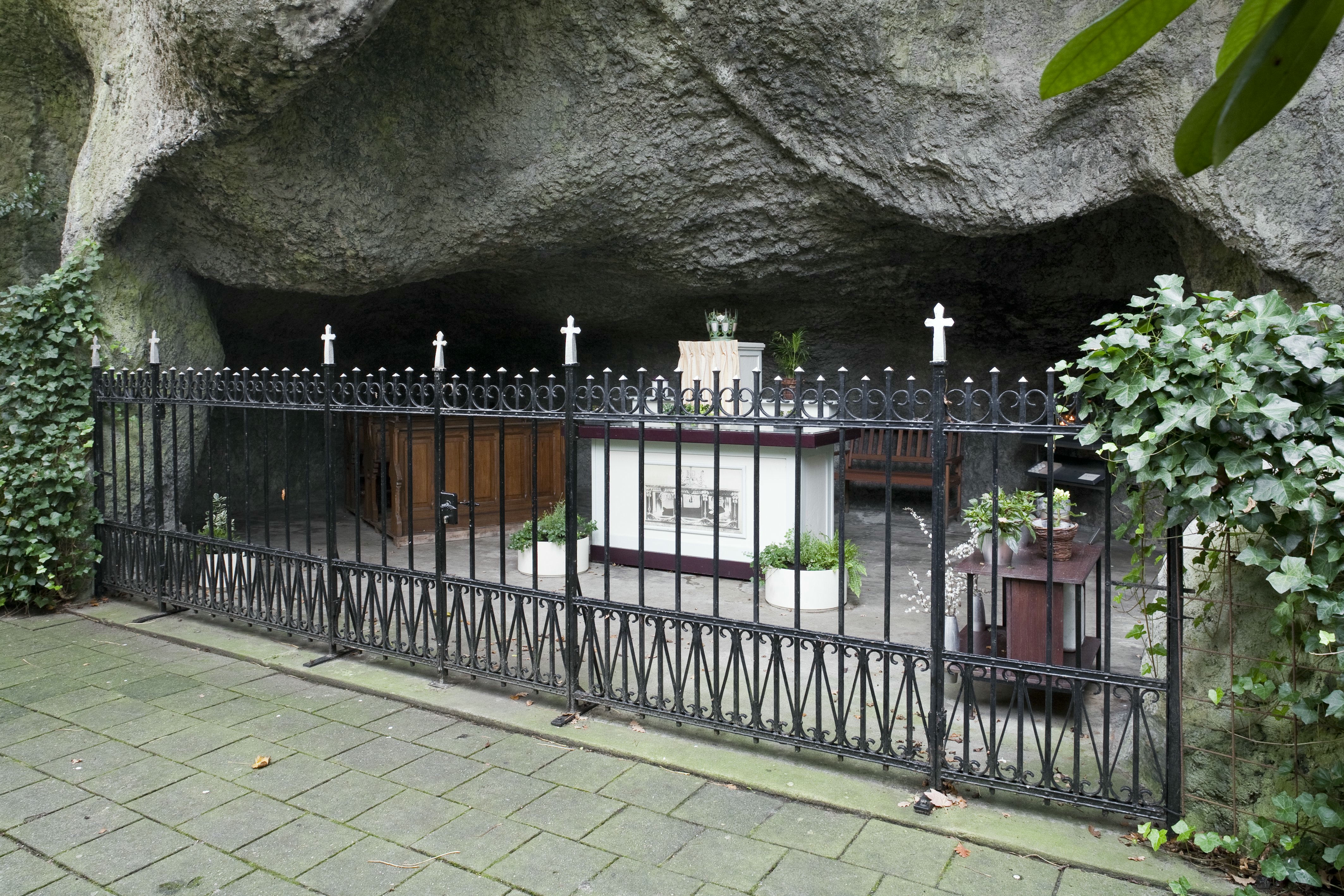 Rooms-katholieke Sint-Nicolaaskerk: Zicht op de Lourdesgrot uit 1933, in de tuin behorende bij de kerk, met smeedijzeren hek